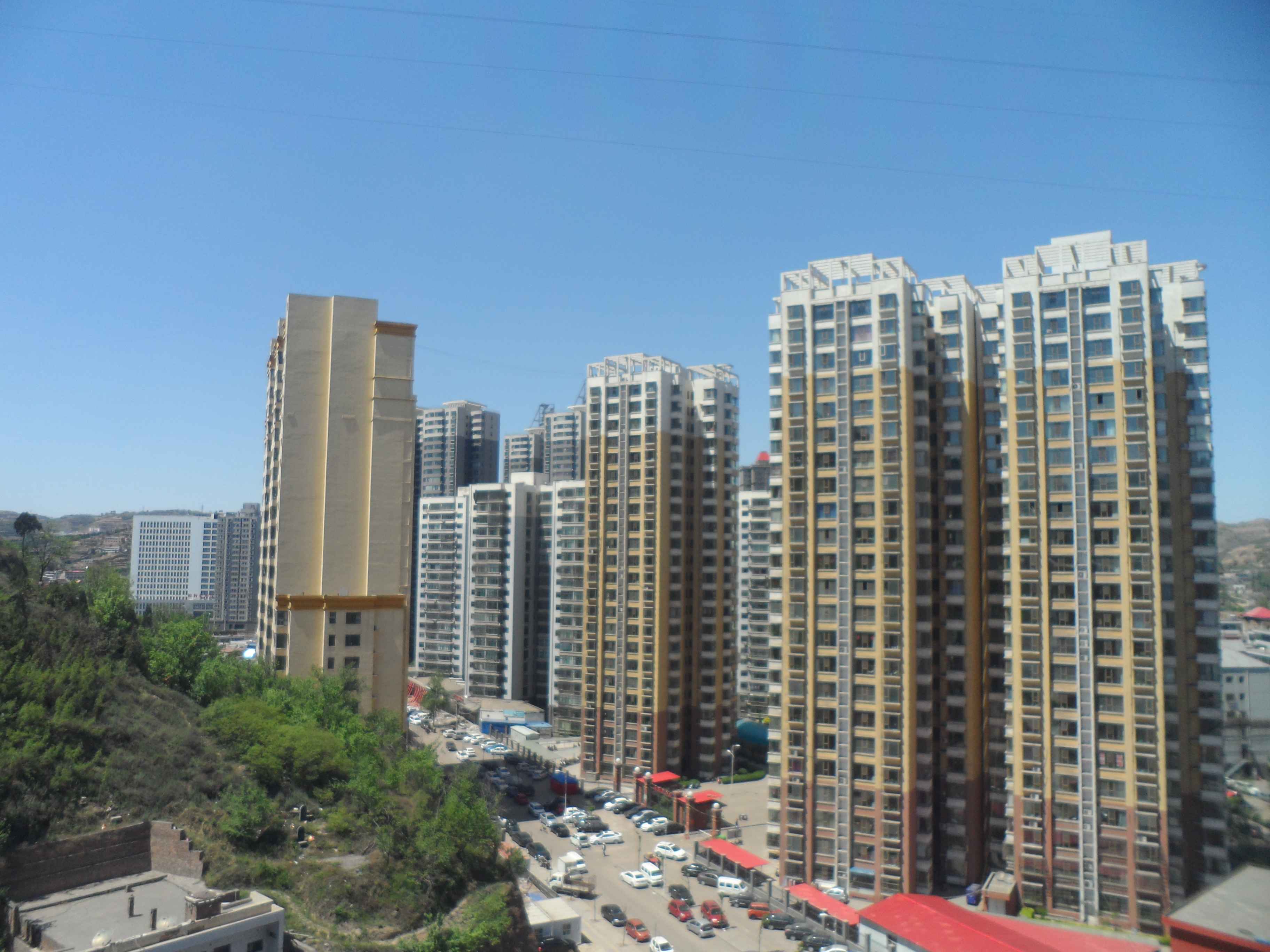 山西柳林县